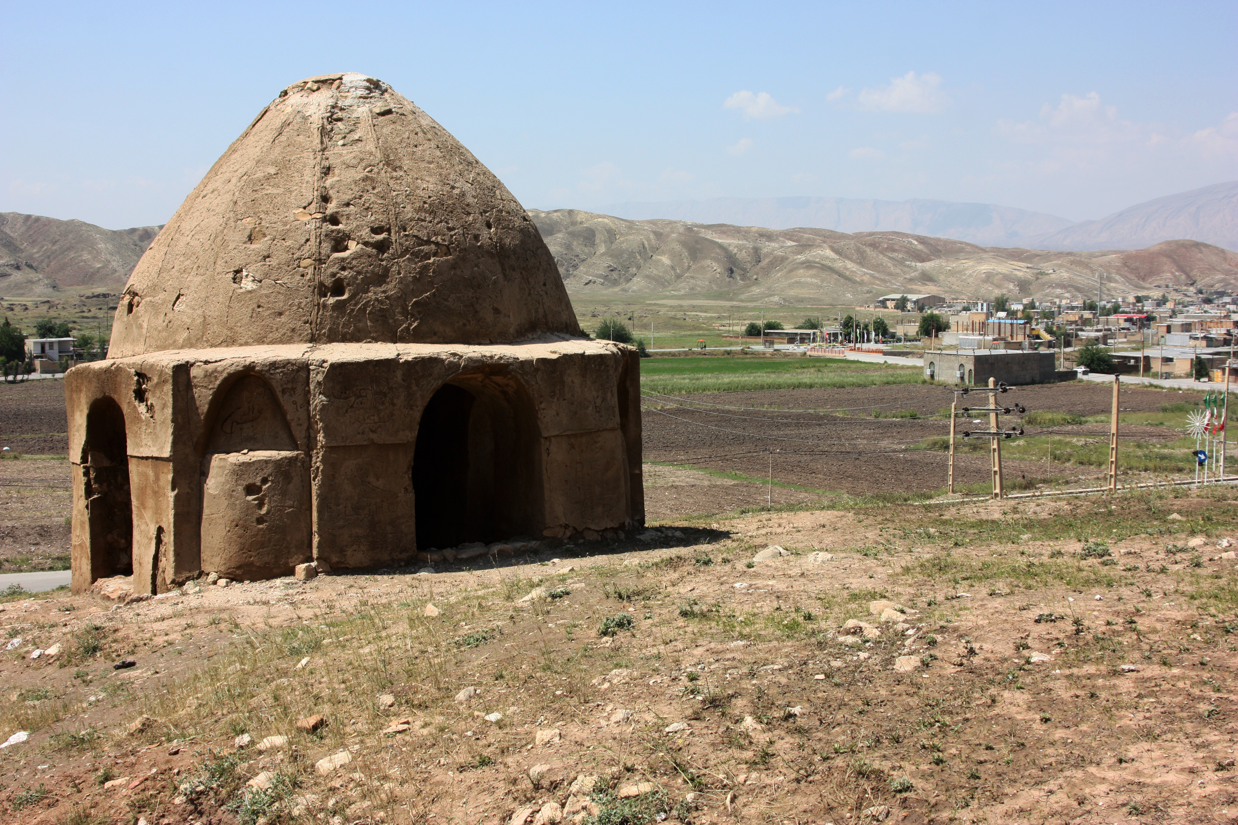 چهار طاقی سرخ اباد دره شهر ایلام